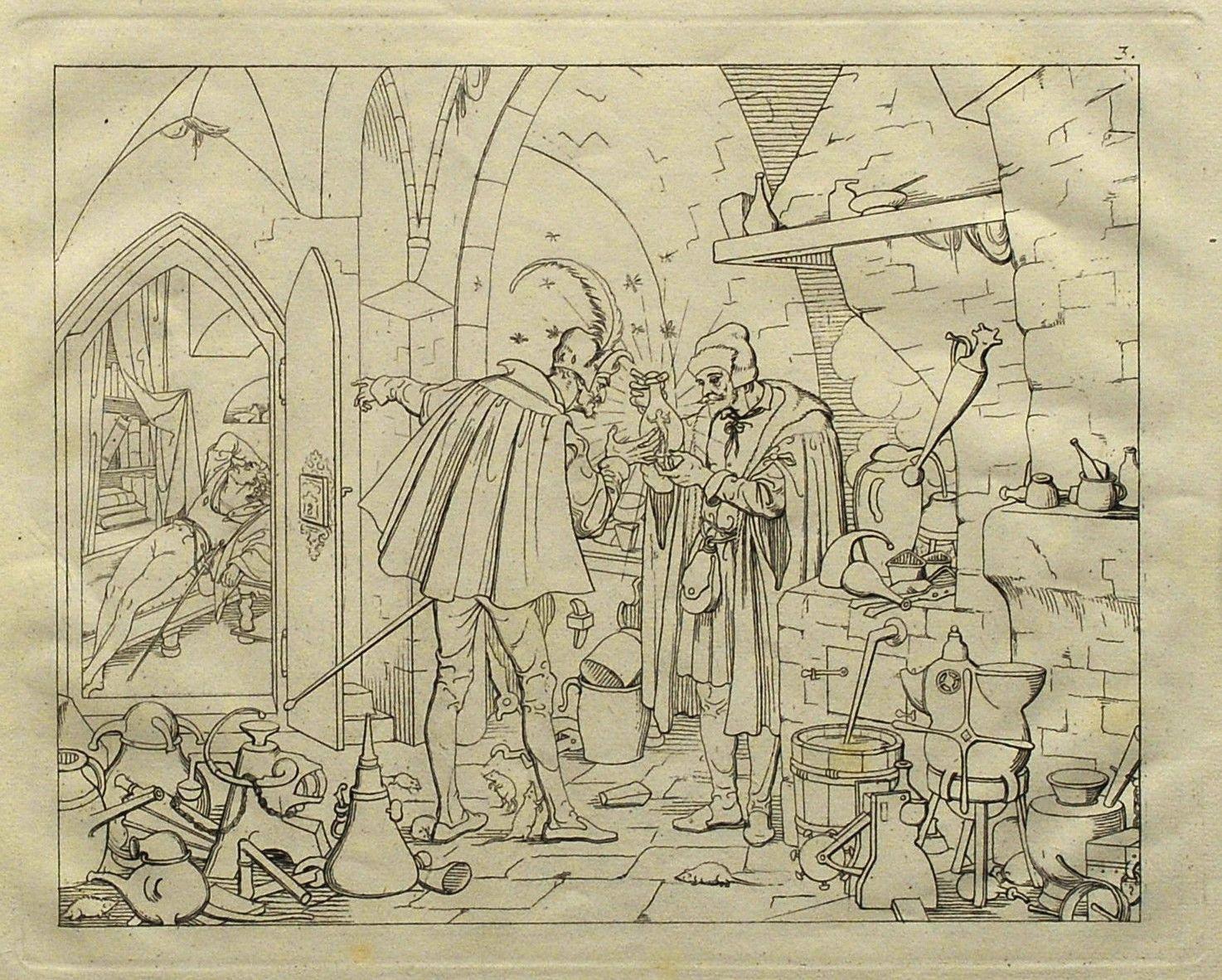 Retzsch, Moritz: Umriss-Radierung (1836) 18,4 x 22,4 cm (Plattenrand). Szene Laboratorium, Faust, der Tragödie zweiter Teil. Aus: Umrisse zu Goethes Faust zweiter Theil. Gezeichnet von Moritz Retzsch. Elf Platten (= Tafeln mit Umriss-Radierungen), nebst Andeutungen (= Kommentare). Stuttgart und Augsburg. J. G. Cotta 1836